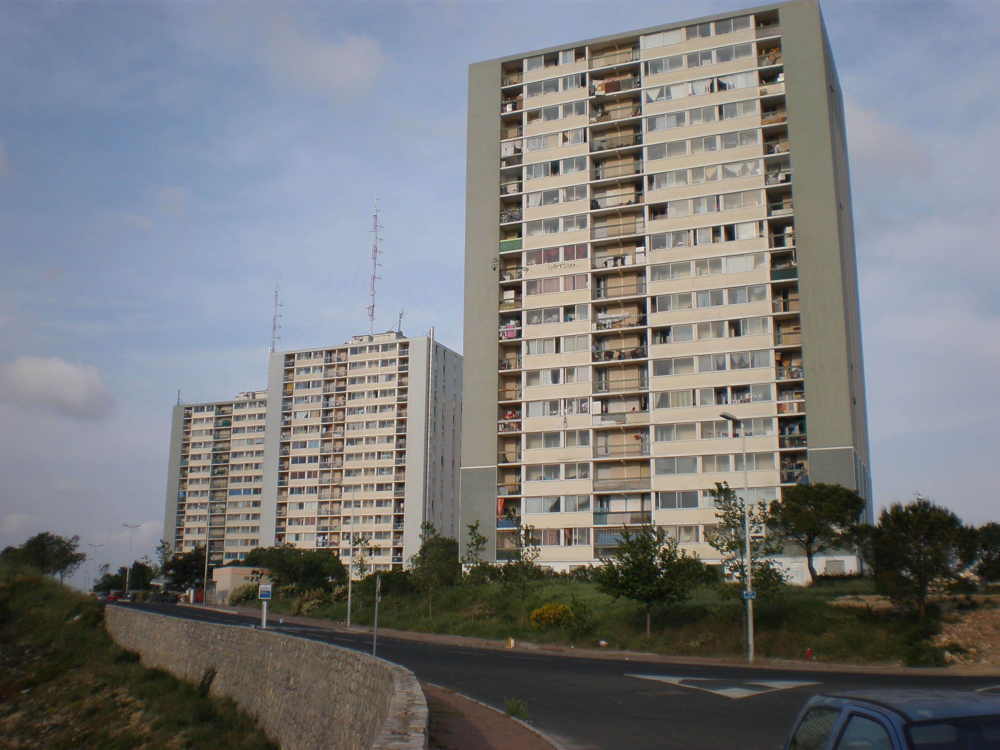 Les trois tours des Tritons (Cambon, Condorcet et d'Alembert) au nord du quartier de la Paillade à Montpellier (France), érigées en 1968